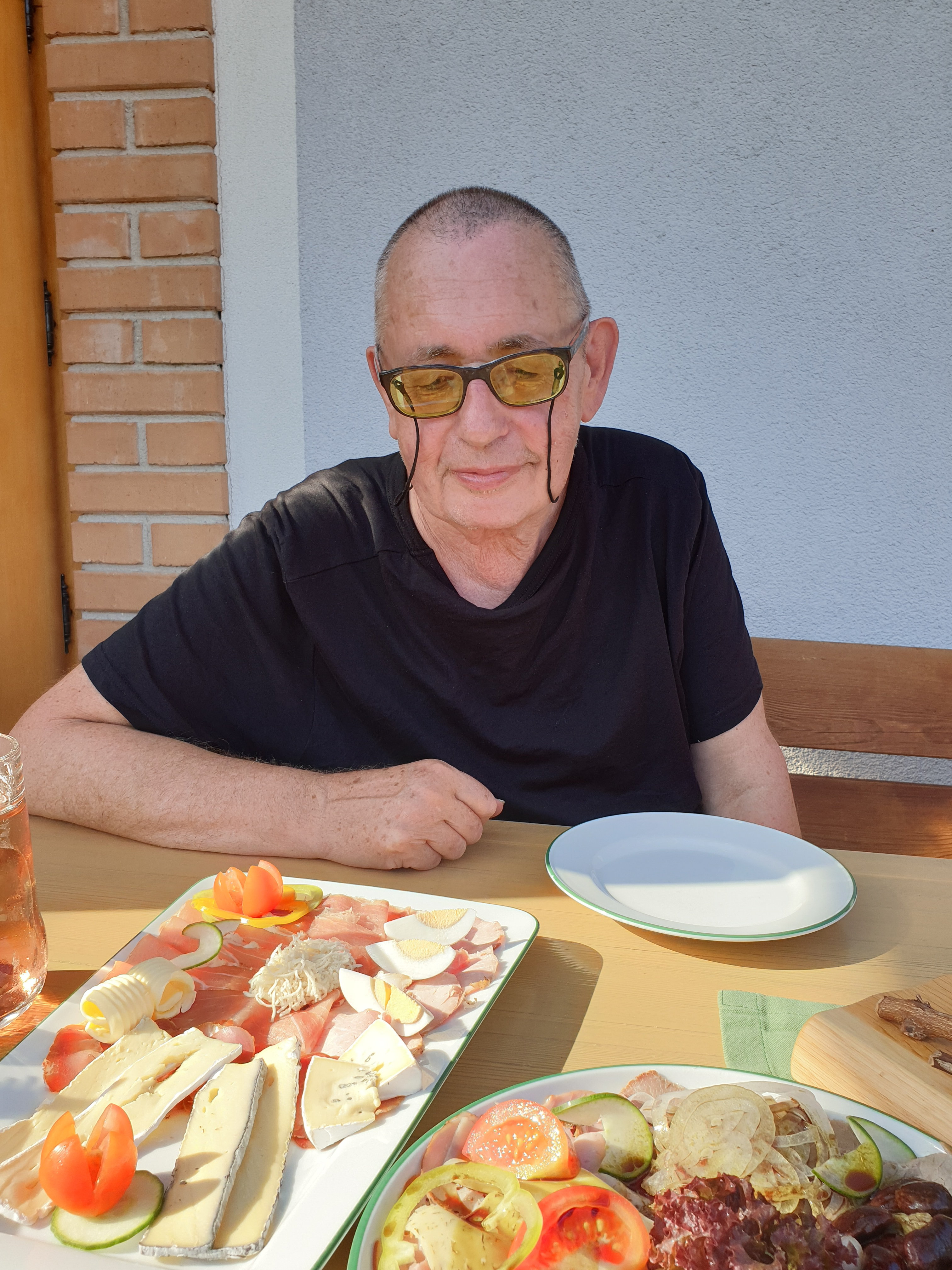 Hans Schafranek, Bad Radkersburg, 2019